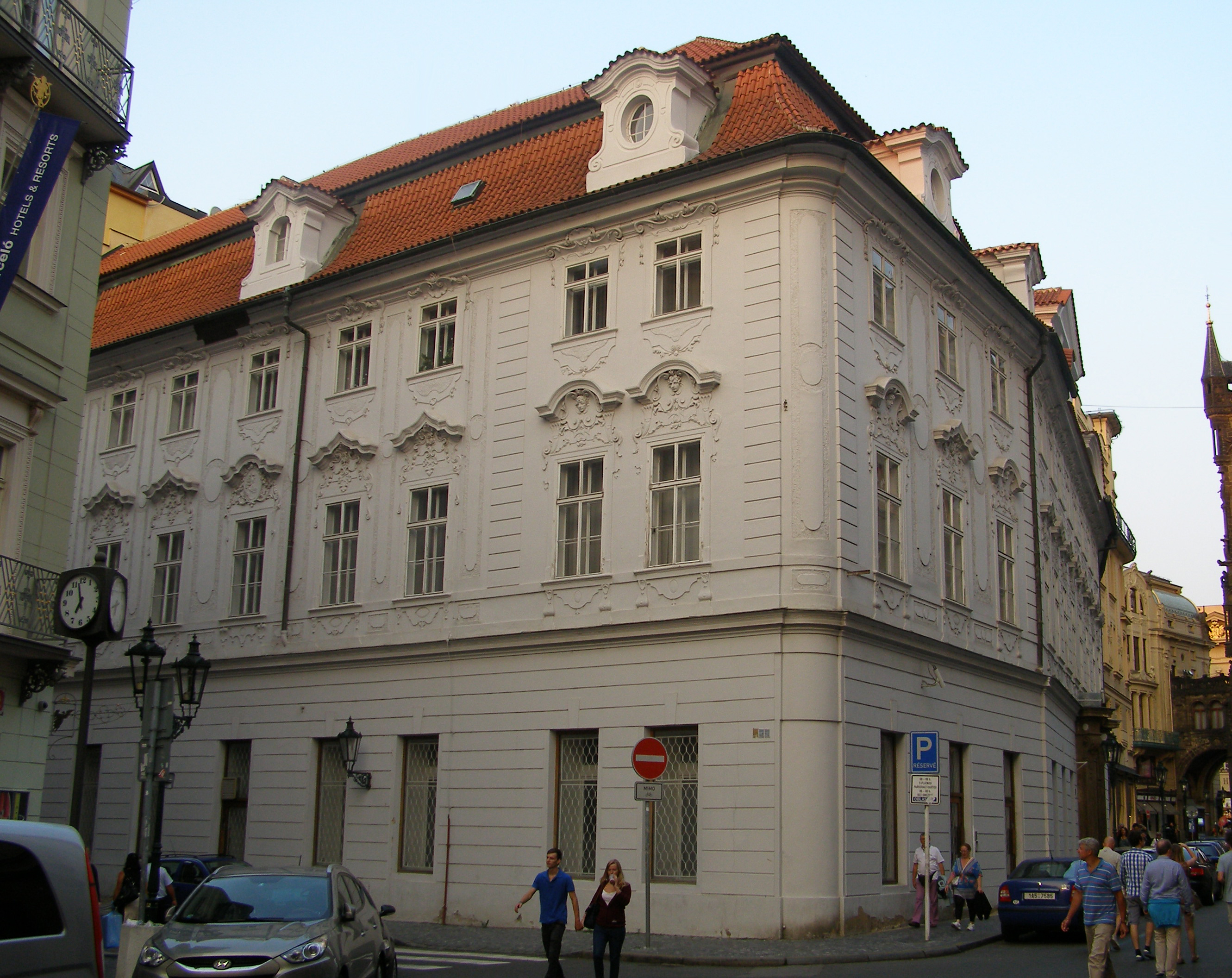 Palác Seebergrovský (Staré Město), Praha 1, Celetná, Králodvorská 585/33, Staré Město